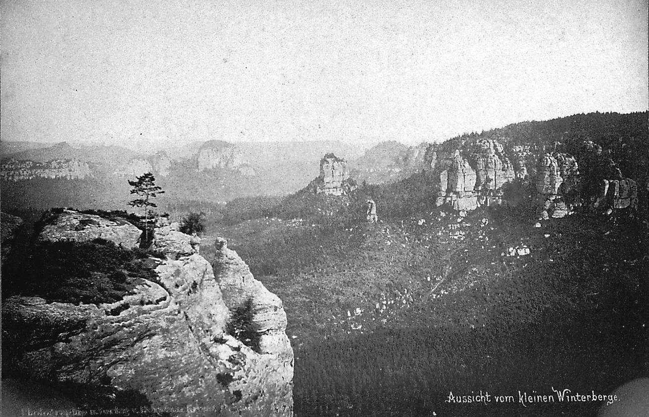 Blick von den Gleitmannshörnern zum Hinteren Raubschloss, Winterstein, kurz davor im Wald die Wartburg, rechts die Pechofenhörner